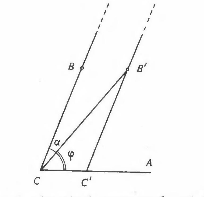 Աստղագիտական աբեռացիայի գծագիրը